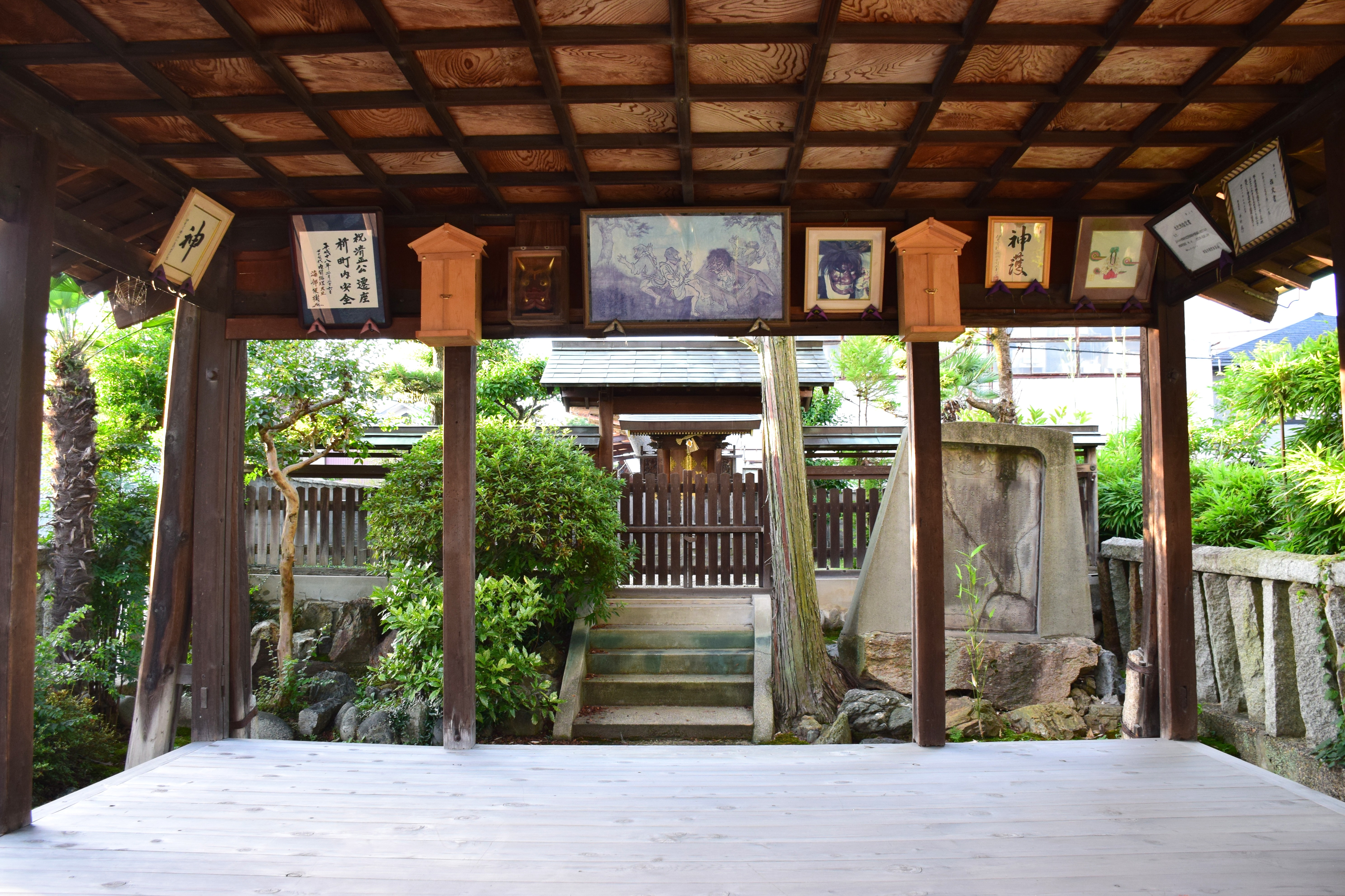 津島市の清正公社